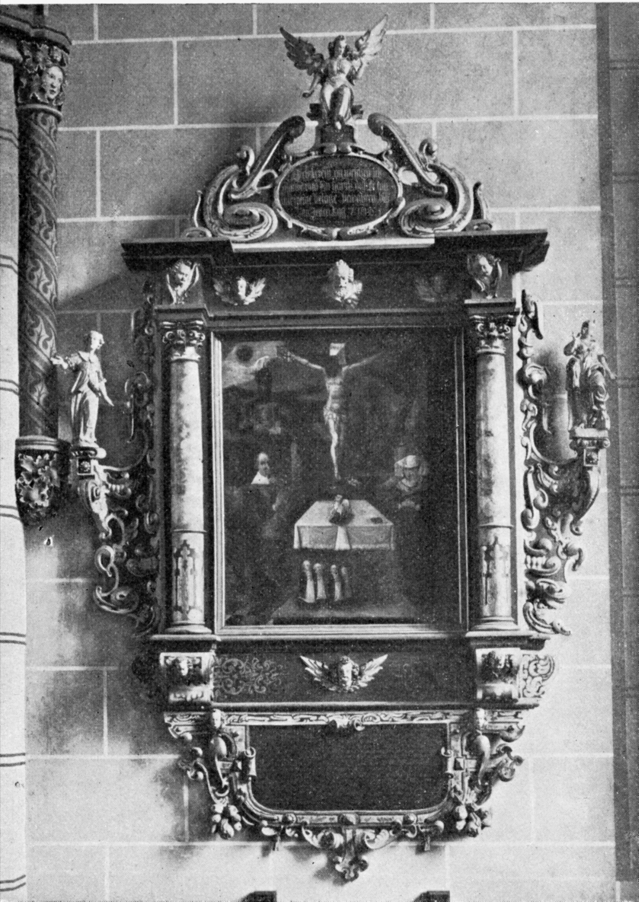 Braunschweig, Andreaskirche: Epitaph von Thomas Fillier und seiner Frau Margaretha, geb. Hoffmeister, von 1650.